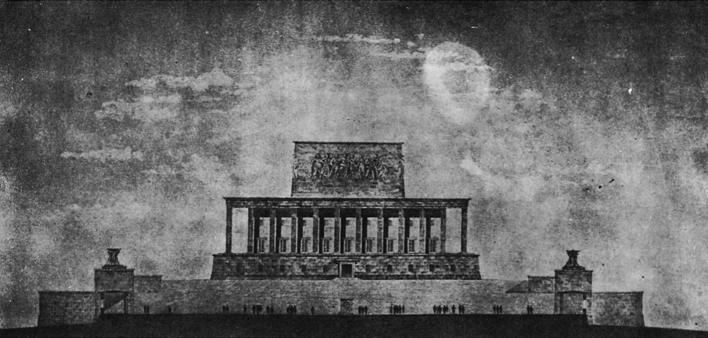 Anıtkabir projesinin ilk sürümü